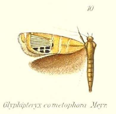 Glyphipterix cometophora